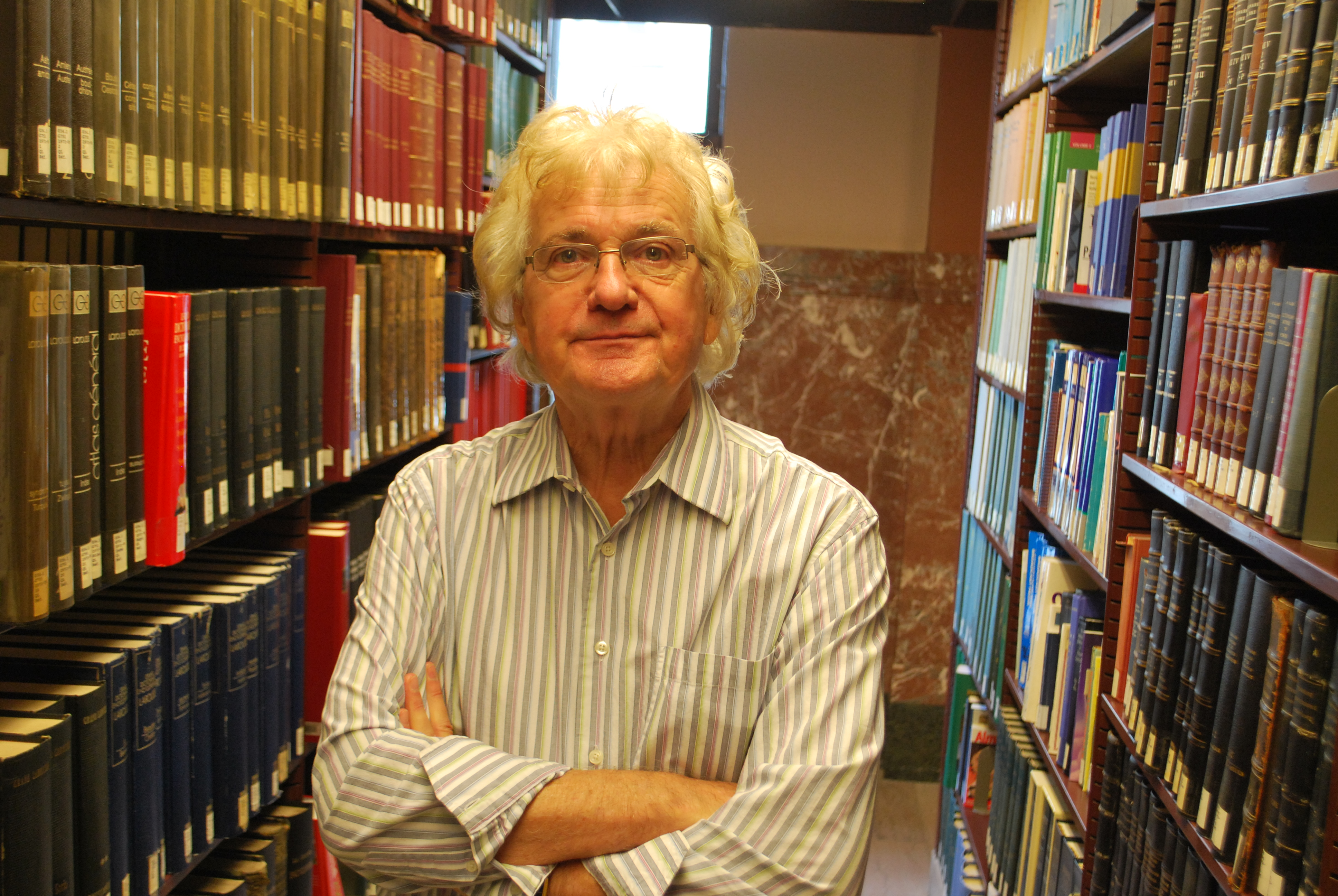 Matthias Rioux, photographié à la bibliothèque de l'Assemblée nationale du Québec.